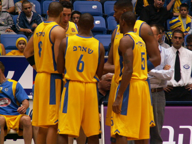 מכבי תל-אביב, כולם למען אחד ואחד למען כולם שארפ פרקר גרין והחברים!. צולם על-ידי אבי קדמי ב - 2005 - 2006.